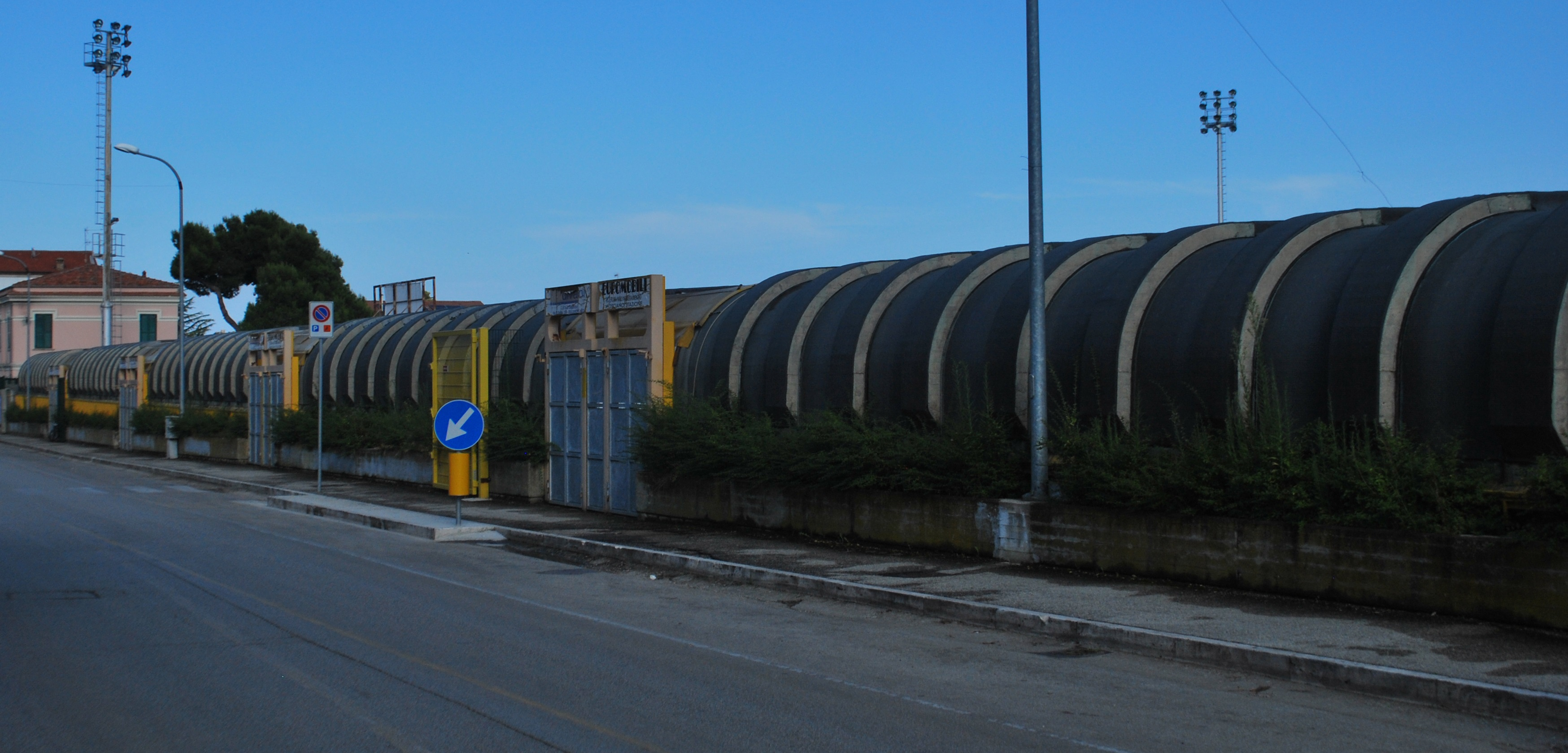 esterno tribuna coperta stadio rubens fadini giulianova